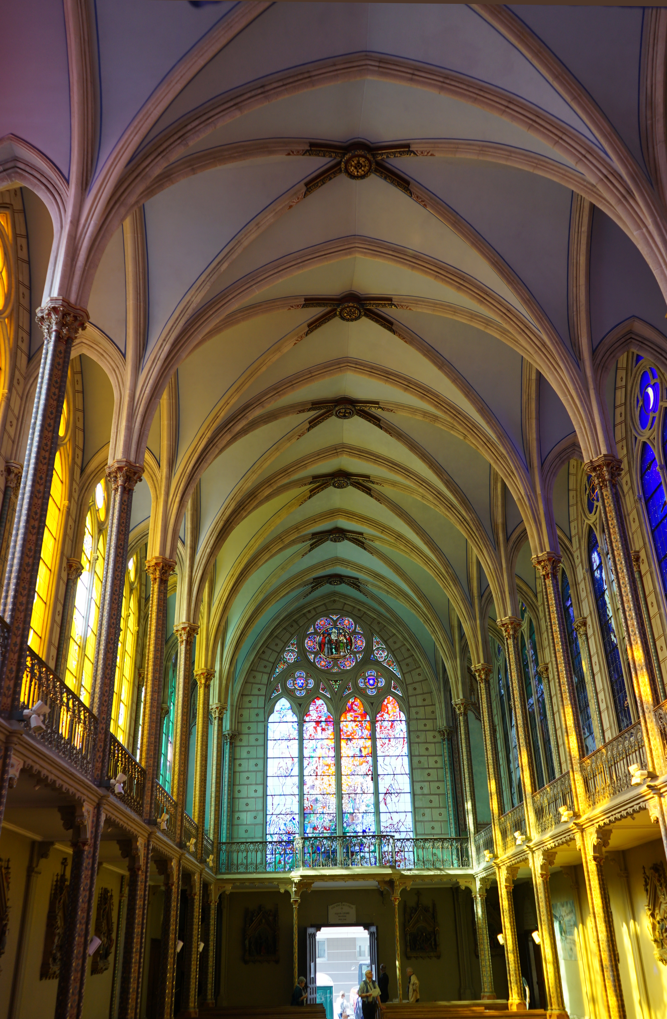 chapelle ouvert pour les journées du patrimoine.